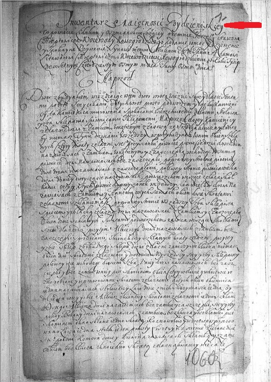 Archiwum Główne Akt Dawnych w Warszawie. Archiwum Radziwiłłów. Inwentarz majętności Goydzieniskiey z 1648 roku, mikrofilm str. 1